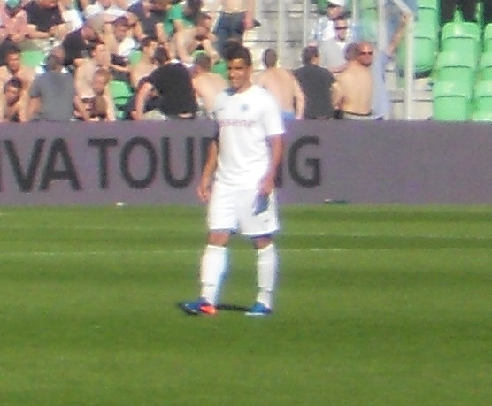 Matías Jones als wisselspeler in de rust van FC Groningen - Ajax (1-0).